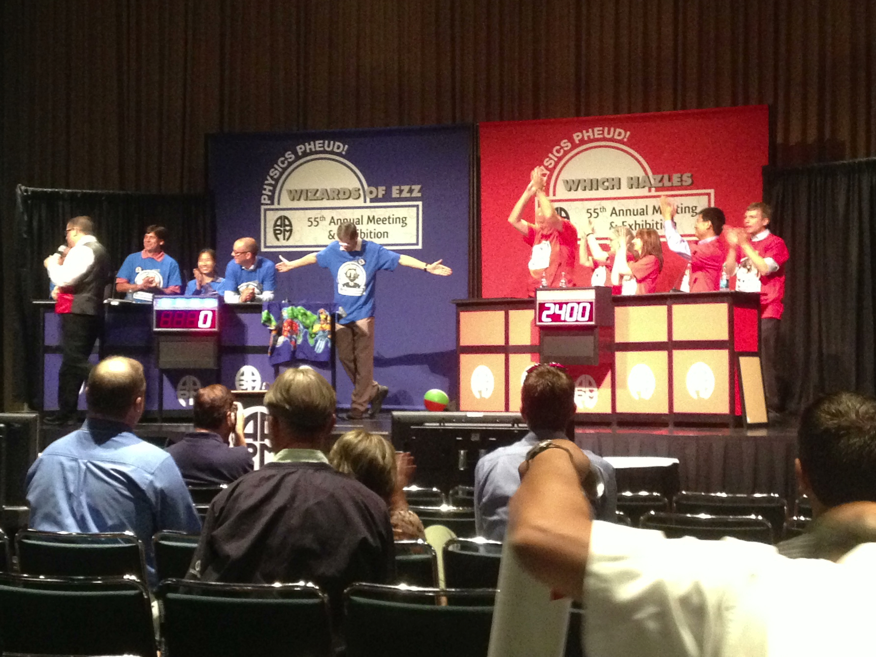 The Physics Pheud. 55th AAPM Annual Meeting, Indianapolis, IN. Team Red (Diagnostics) is represented by John Hazle. Team Blue (Therapy) is represented by Gary Ezzeli.